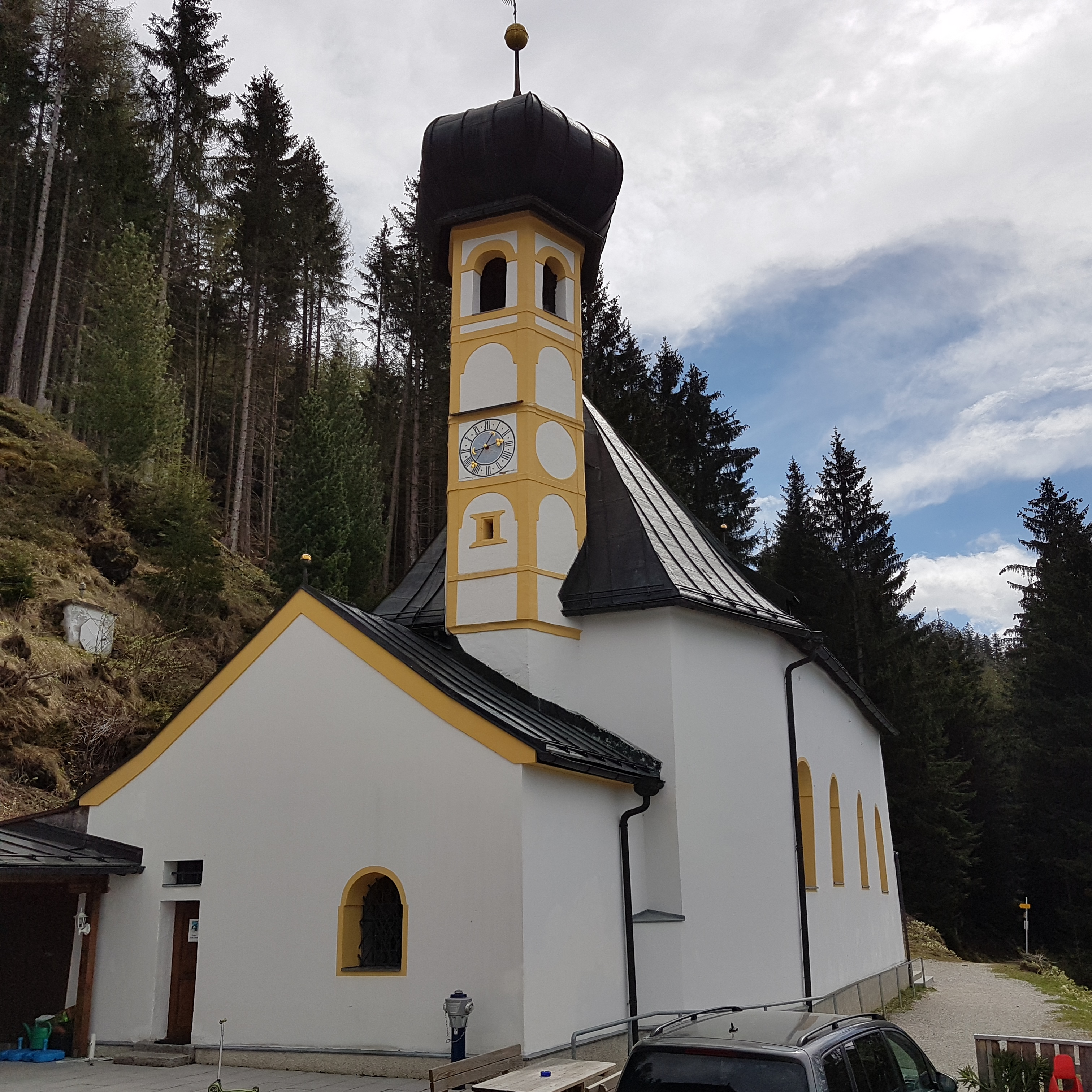 Wallfahrtskirche Heiligwasser, von West